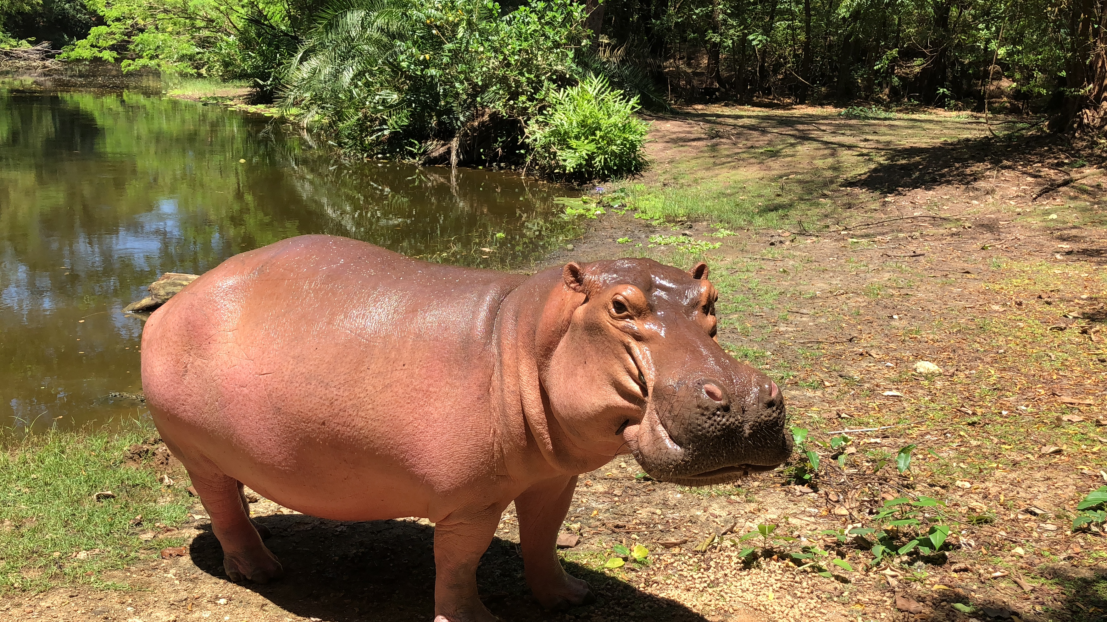 Zdjęcie Owena - Haller Park - Mombasa - Kenia, zdj. Doreen Urbańska